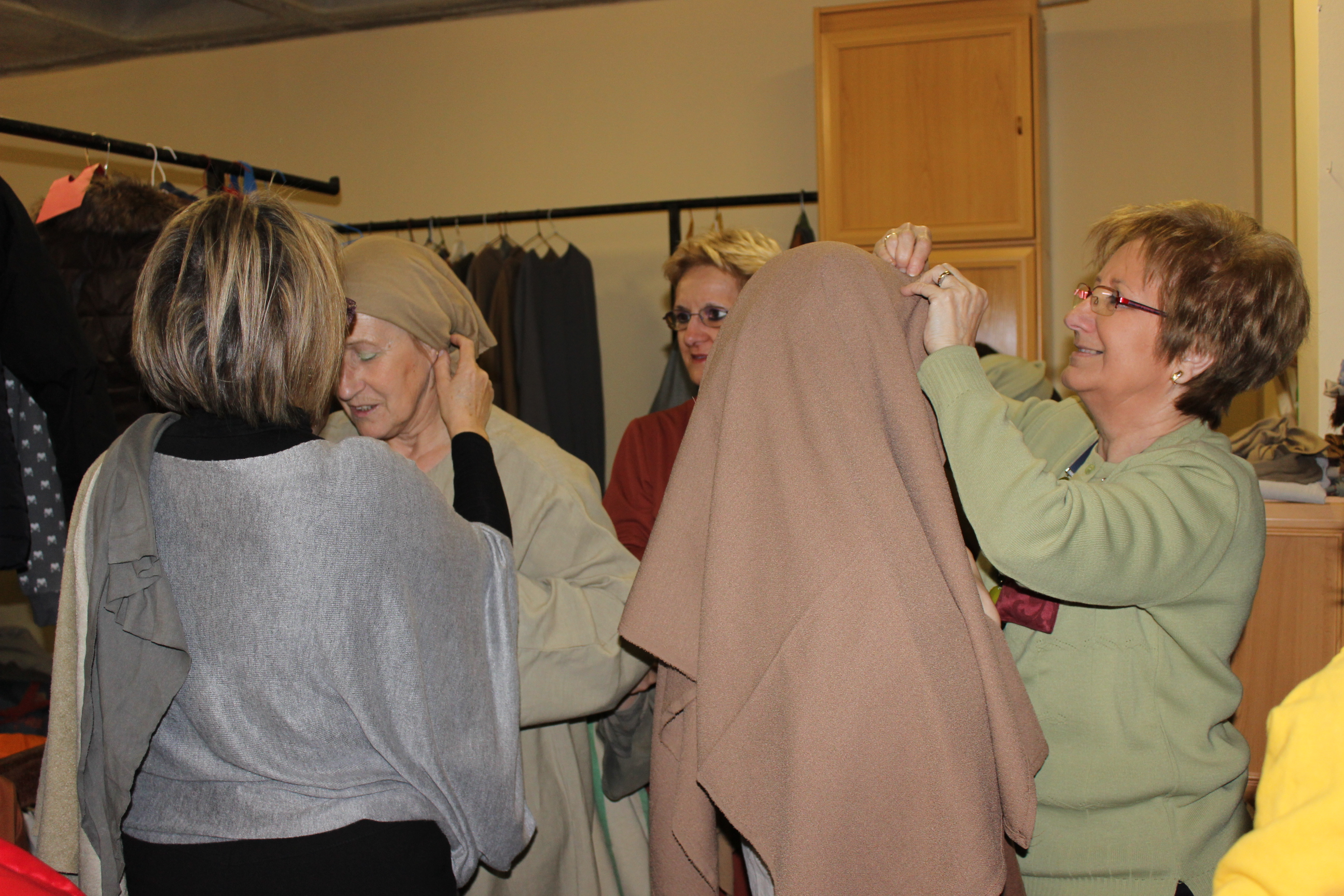 La Passió d'Olesa. Activitat darrere l'escenari abans i durant la representació. Senyores de la secció de vestuari ajudant unes dones a posar-se el mantell al cap.